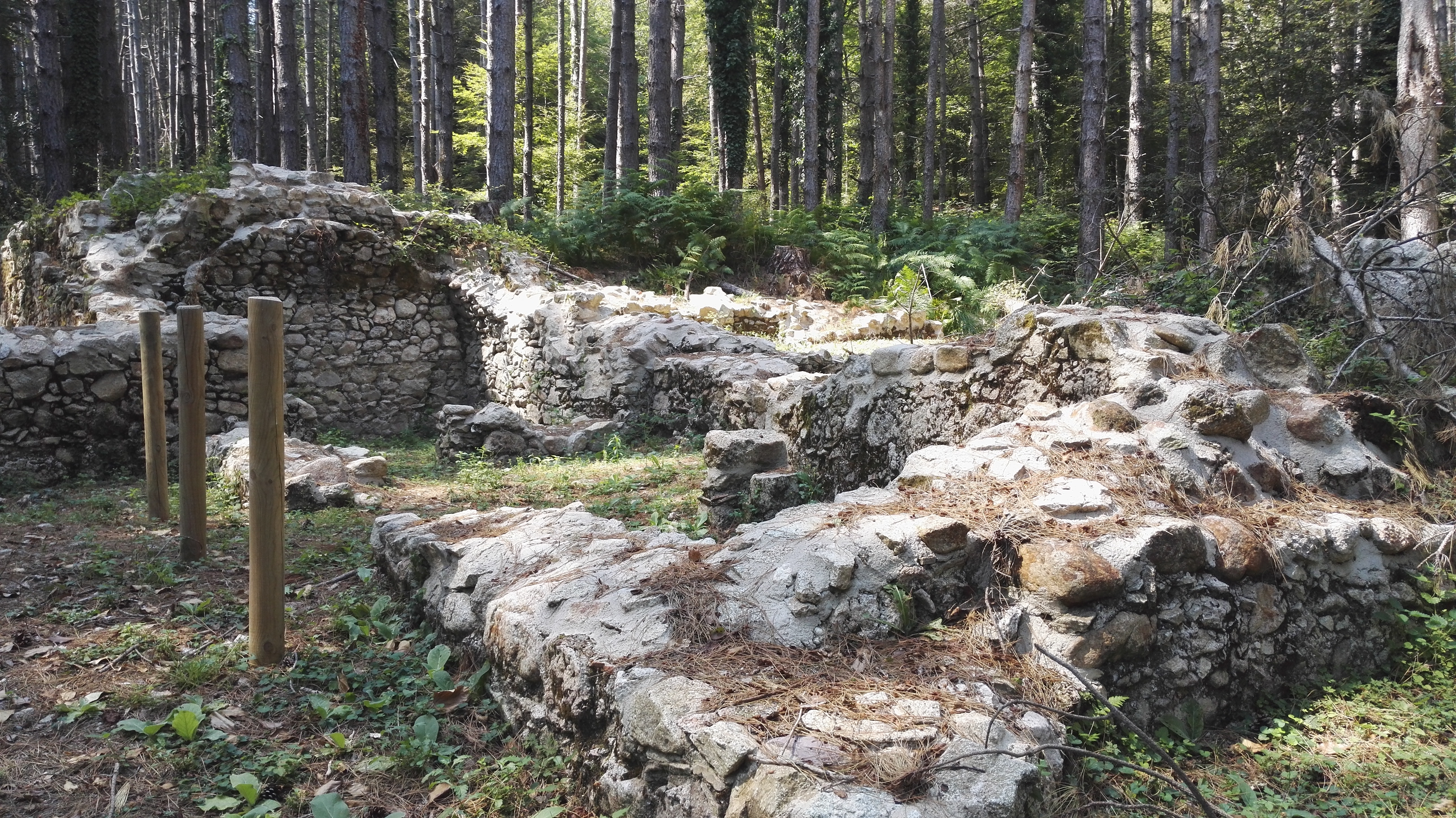 Parco siderurgico di Chiesa Vecchia (Ferdinandea) Chiesa e Palazzo amministrativo